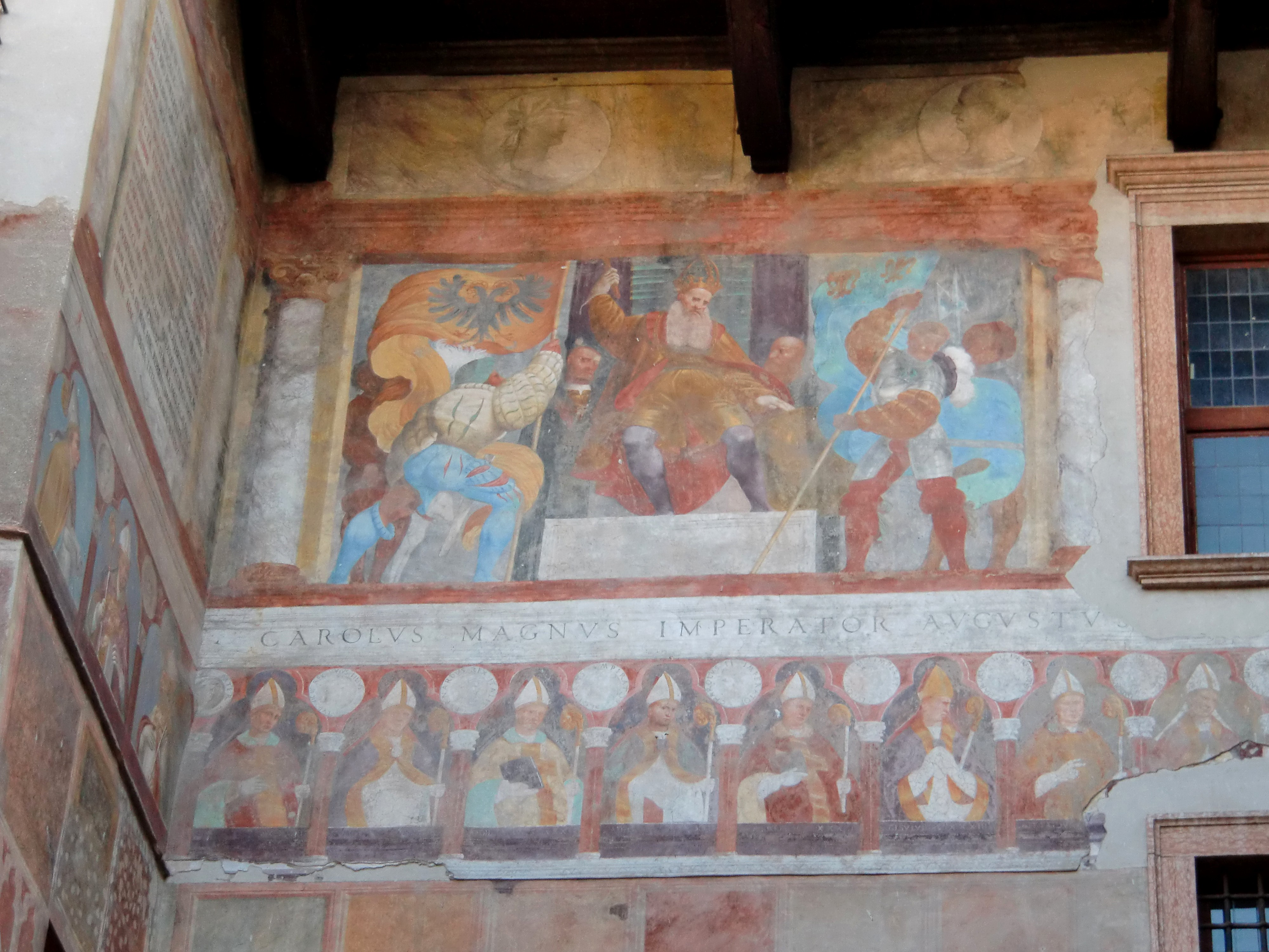 Marcello Fogolino, Charlemagne on his throne, ca. 1528, Castello del Buonconsiglio, Trento